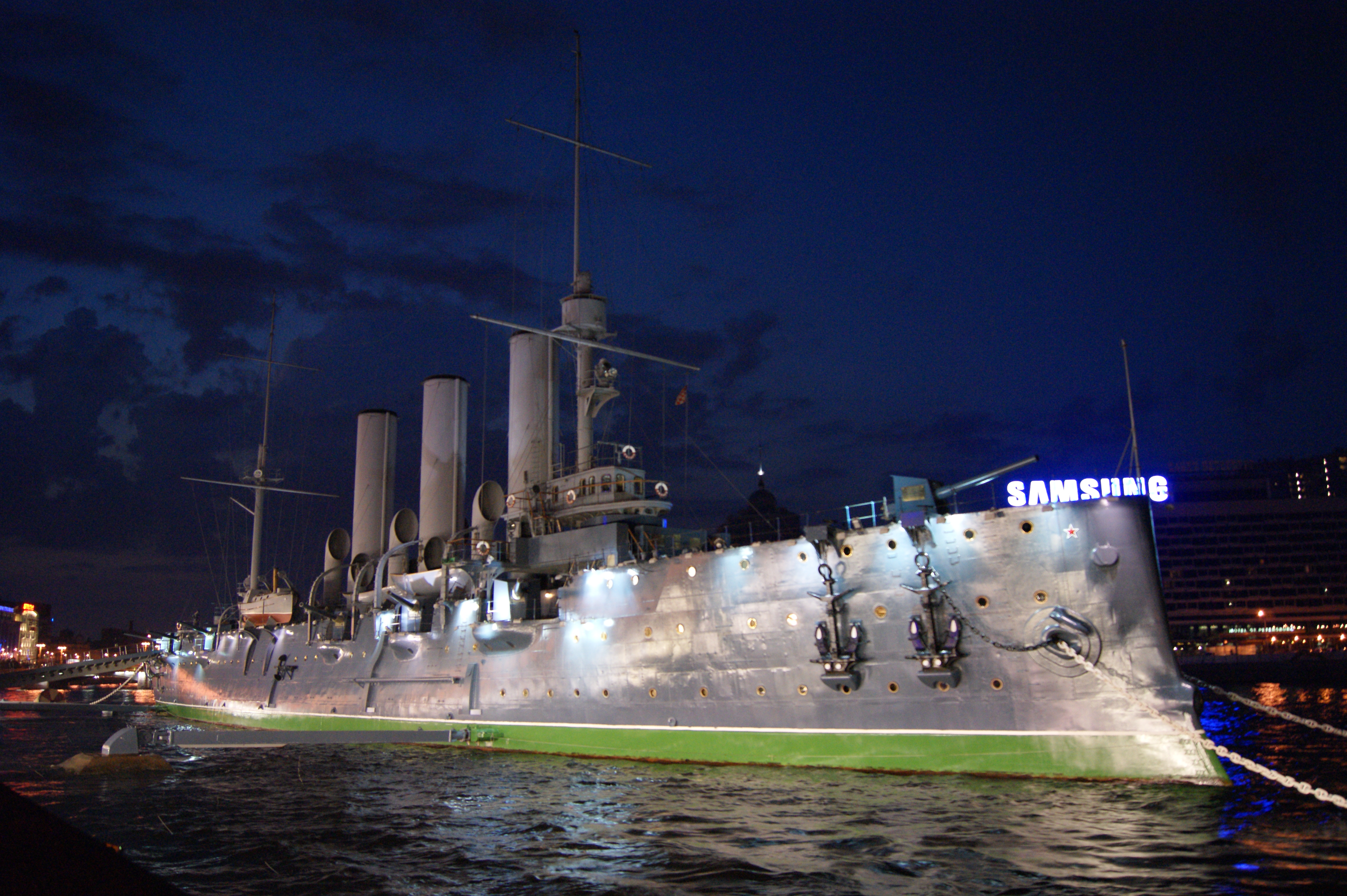 Ночь. Петербург. Аврора